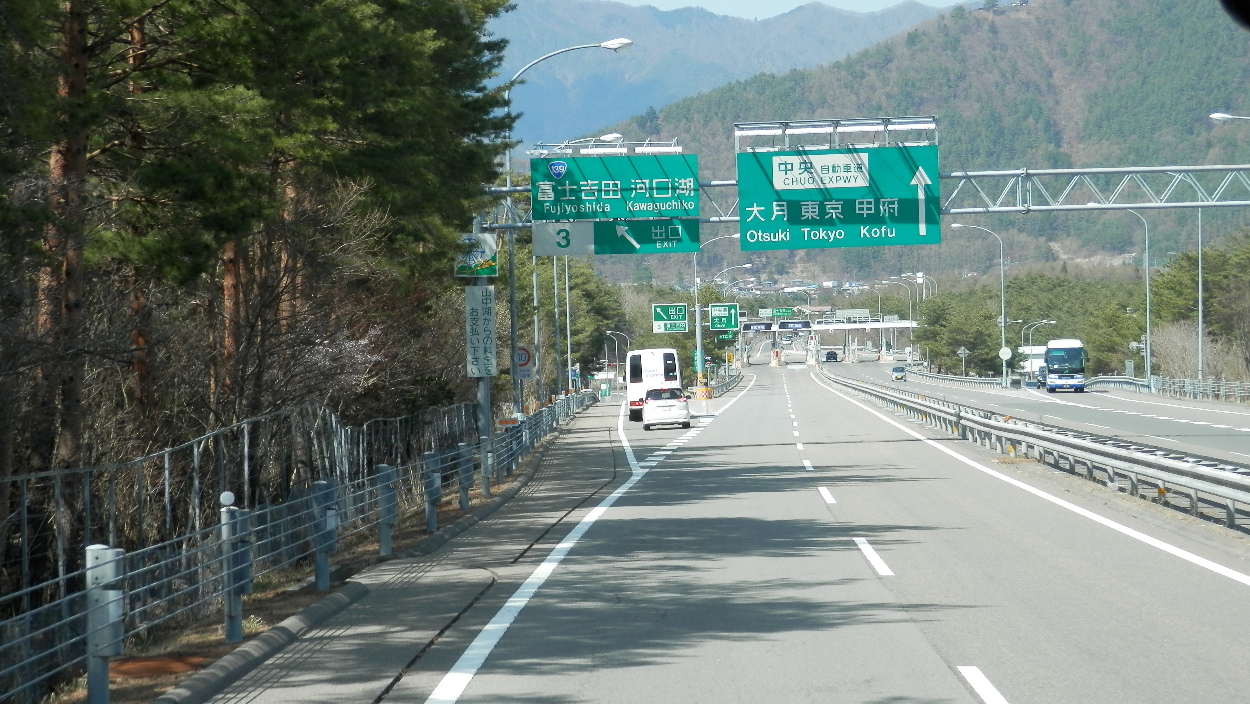 富士吉田インターチェンジ。Panoramioより転載。